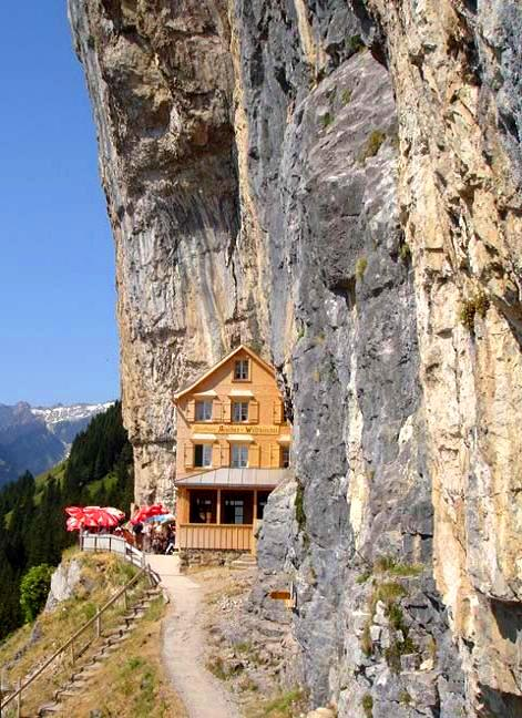 Berggastaus Aescher-Wildkirchli, Appenzell Alps